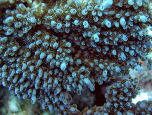 Acropora abrotanoides, vista de coralitos. Samoa Americana